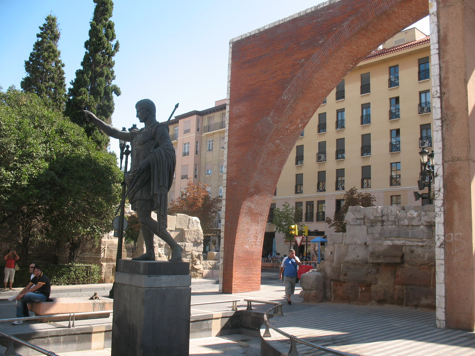 Император Октавиан Август – основатель Сарагосы